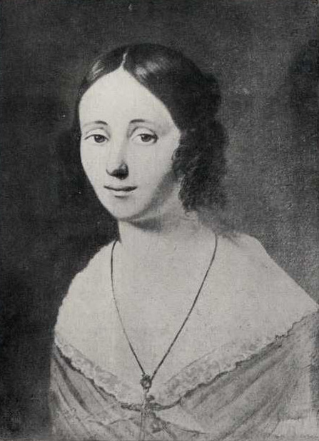 Sophie Emma Clemenceau, née Gautreau.